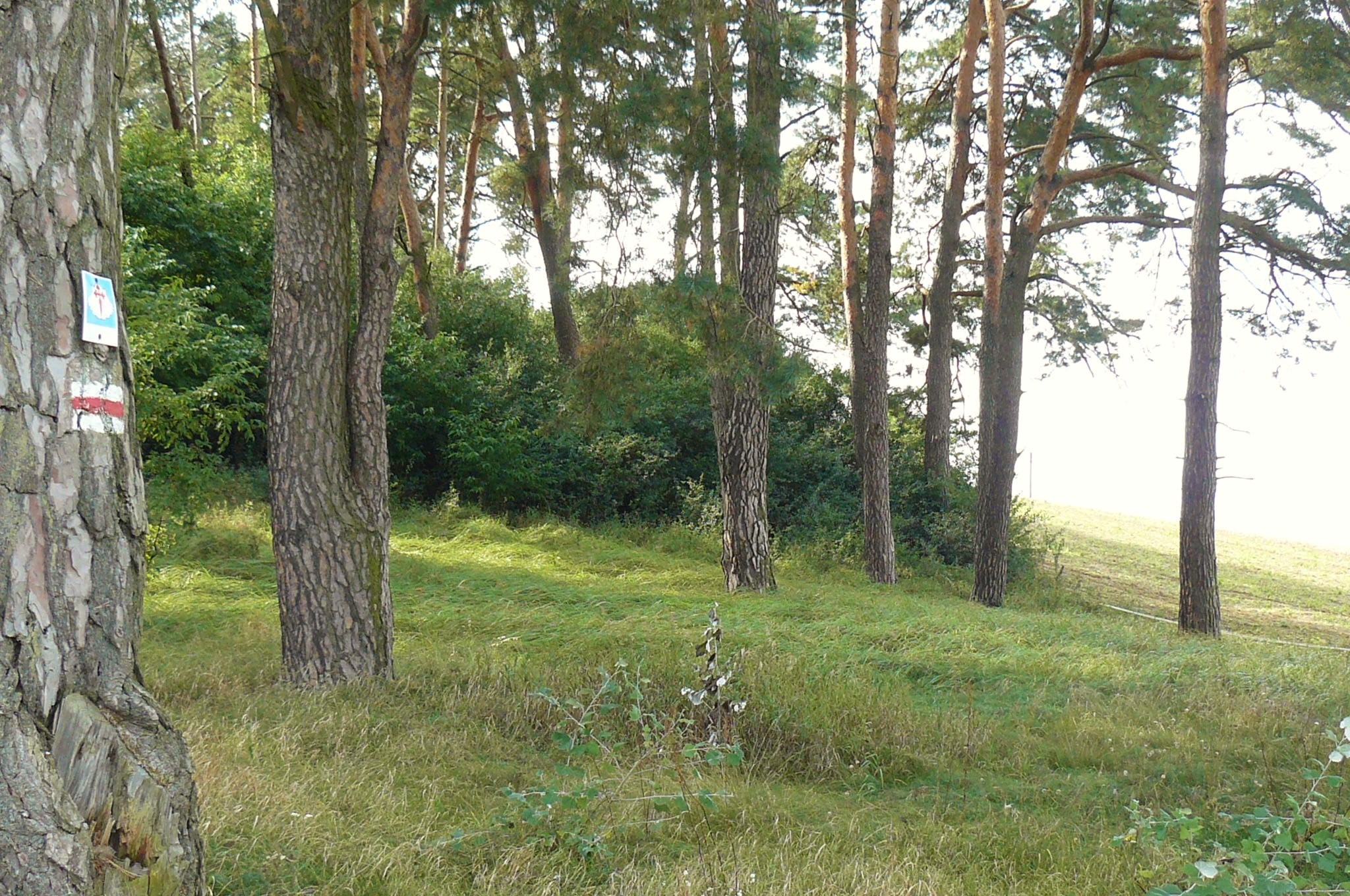 Żabińskie Góry koło Żabna.